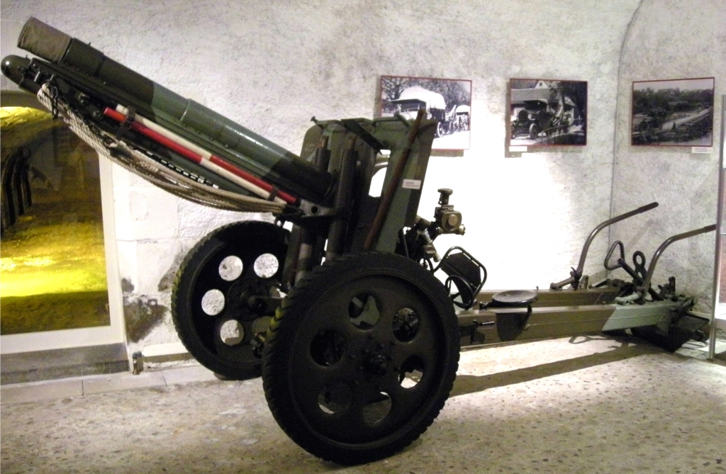 7,5 cm Kanone 03/42 L30 Spreizlafette